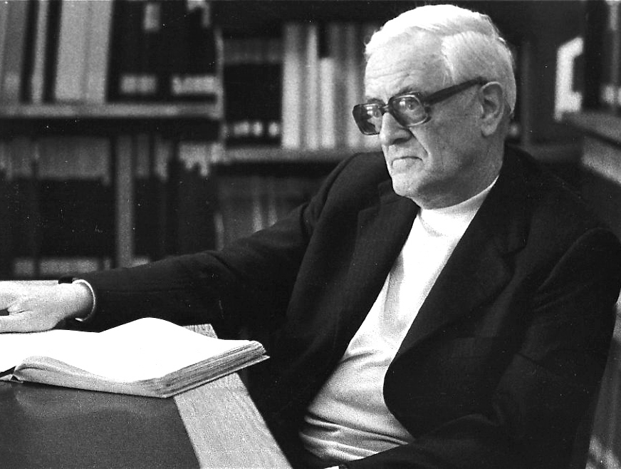 Der Komponist Heinrich Sutermeister (1910-1995) in der Zentralbibliothek Zürich